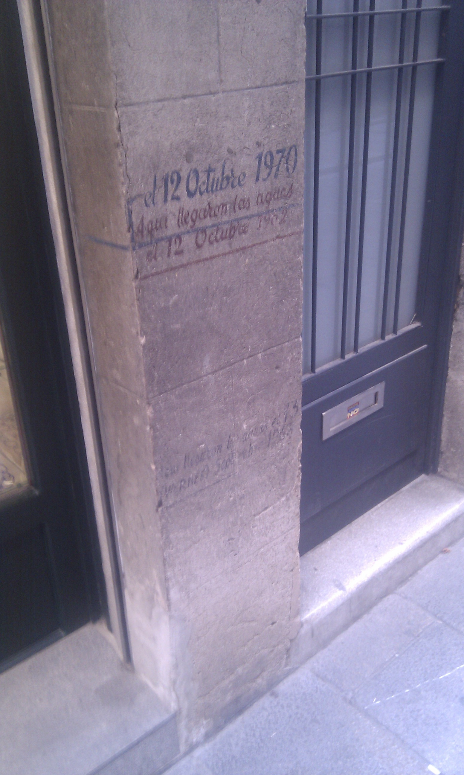 Nivell on van arribar les aigües en diferents inundacions de la segona meitat del segle XX, al carrer de les Ballesteries de Girona